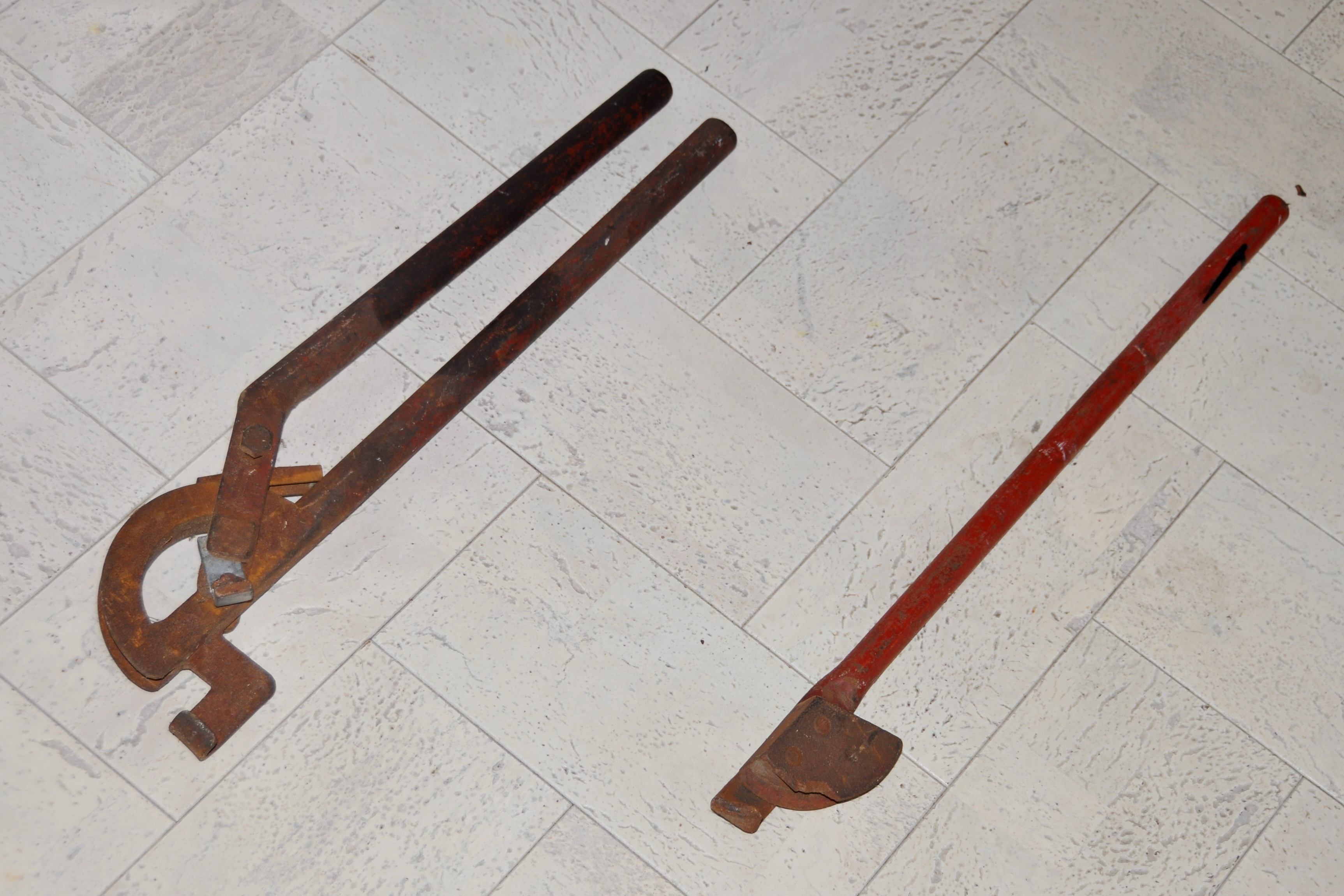 Buigmachine en buigblok voor unionbuis.